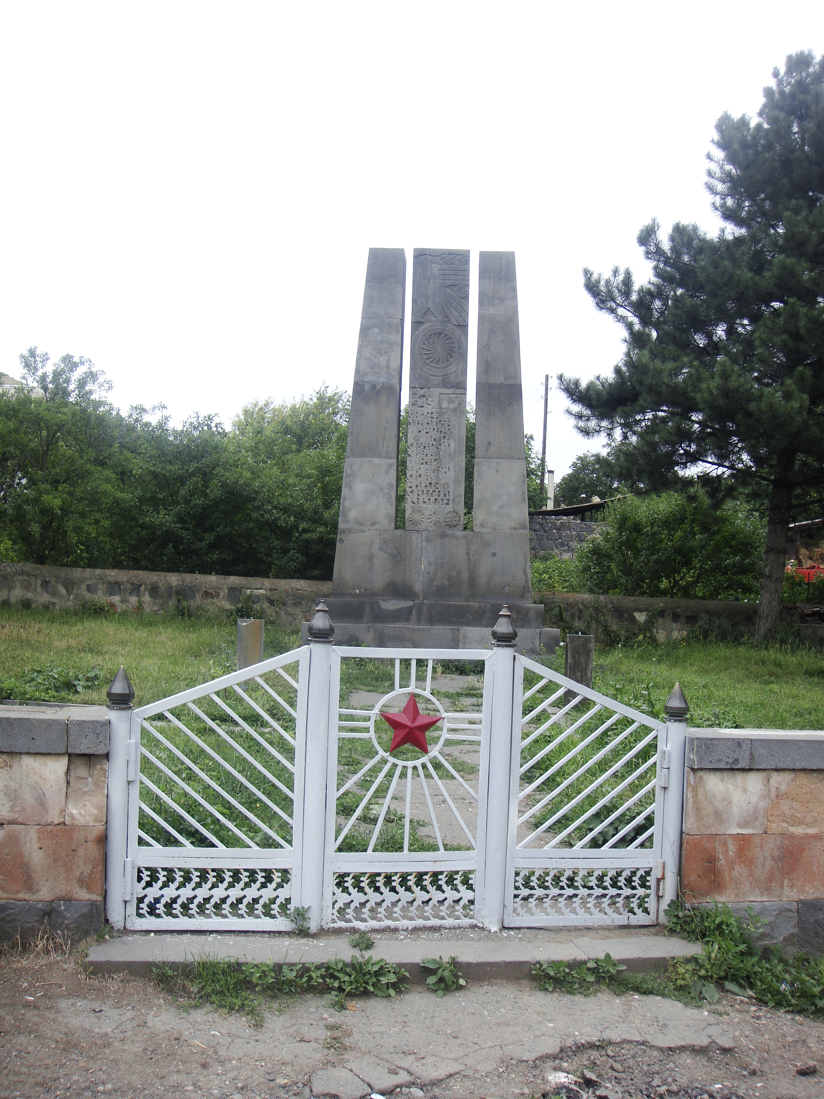 Հուշարձան՝ Երկրորդ Աշխարհամարտում Զոհվածներին, 1970 թ. 20/8